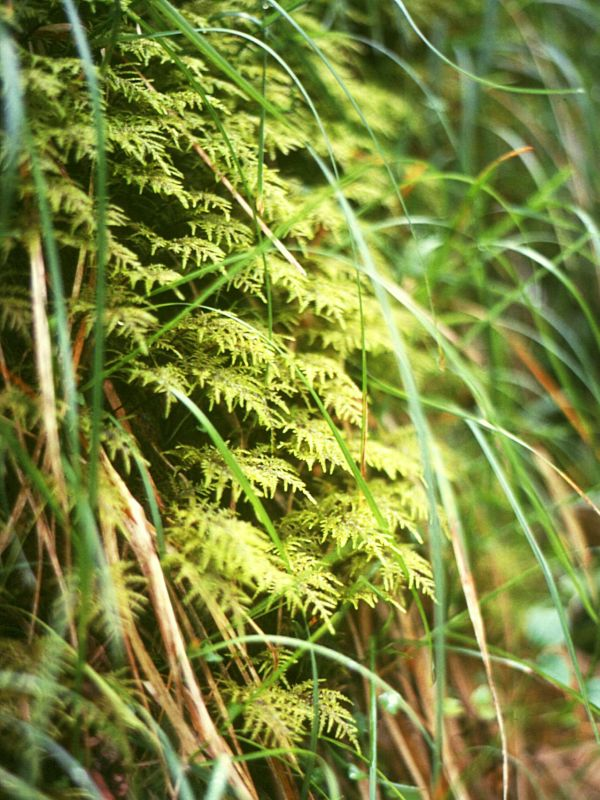 Hylocomium splendens, Hylocomiaceae - Österreich/Austria/Autriche: Niederösterreich, Erlauftal E Gaming, Vordere Tormäuer